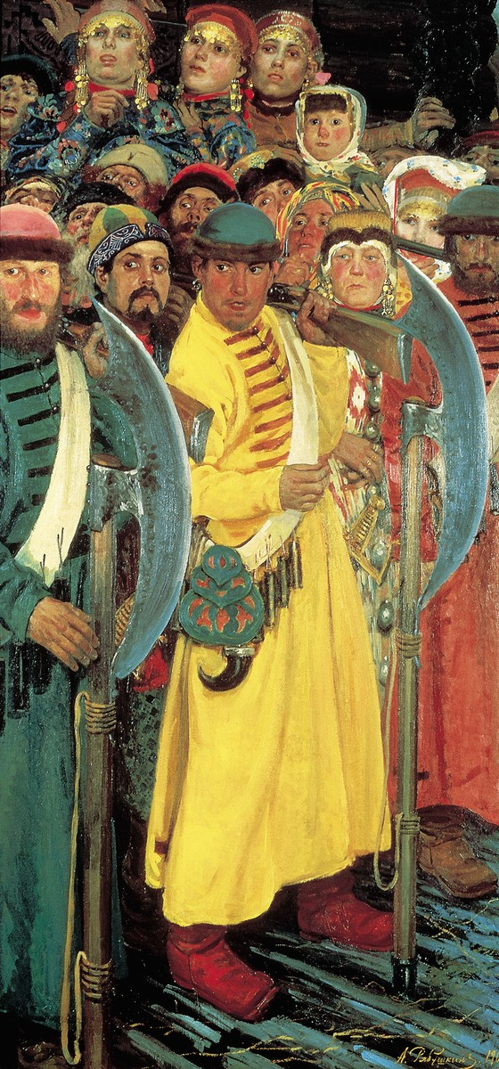 Едут! (Народ московский во время въезда иностранного посольства в Москву в конце XVII века). 1901. Холст, масло. 204x102 см. Государственный Русский музей, Санкт-Петербург